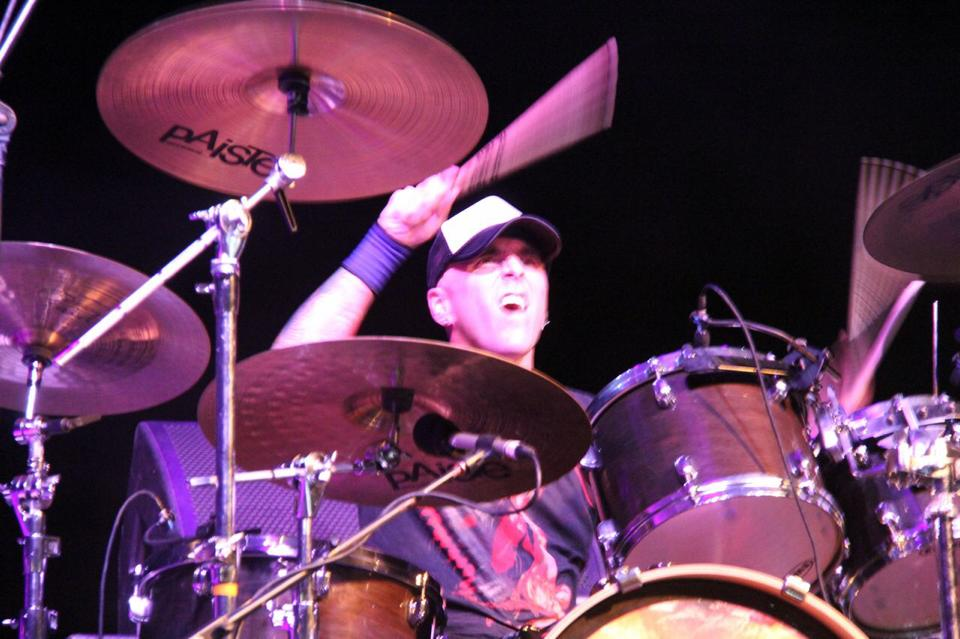 Yo tome esta fotografía ya que tengo acceso a la tarima. Es de mi completa autoria.